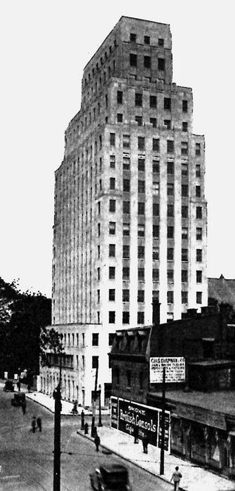 Ross et Macdonald. Architects’ Building, Montréal, 1929-1934. Démoli. Photographie tirée de Construction, juin 1931